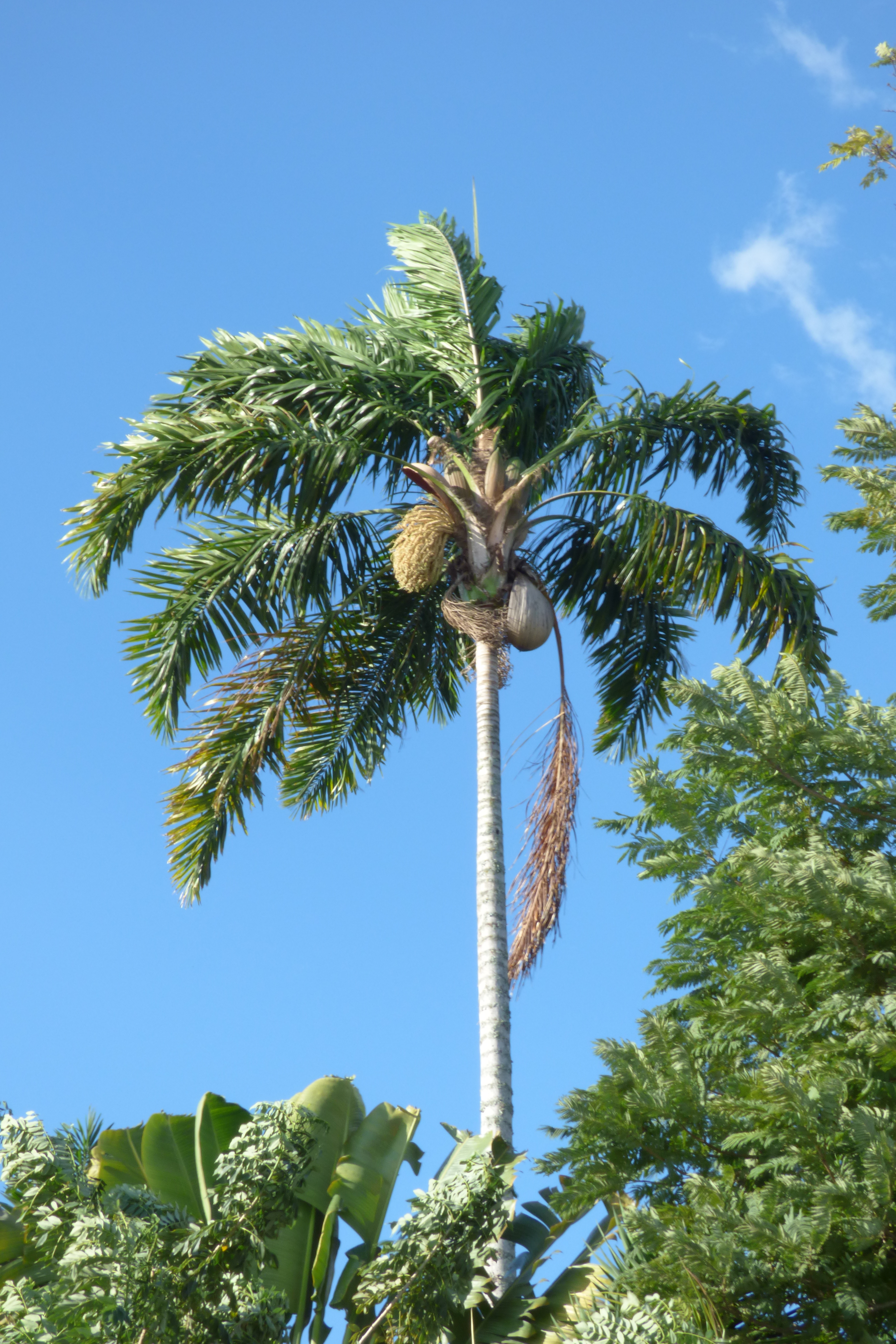 Zancona - Chonta (Syagrus sancona)